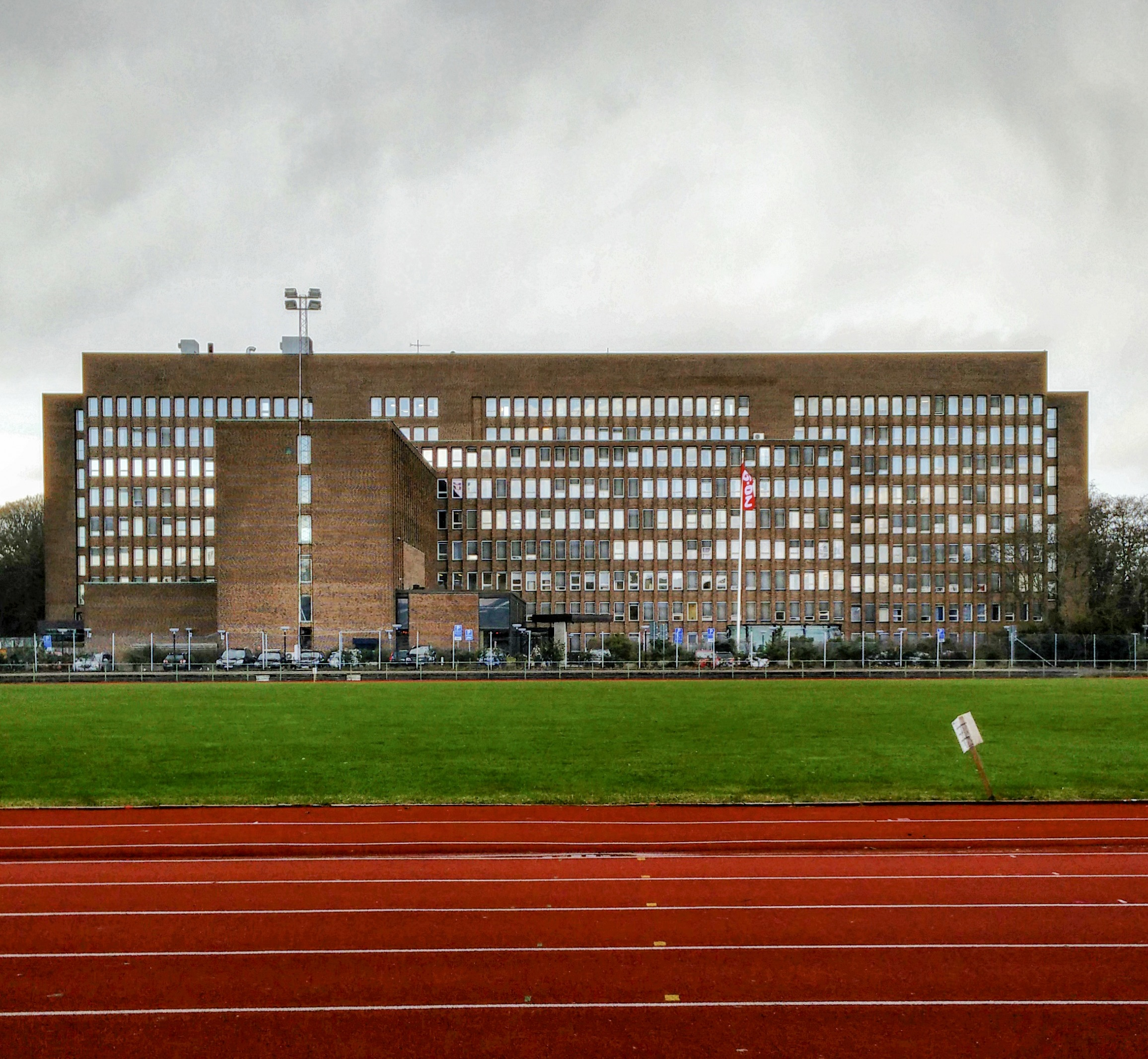 E.ONs Sveriges huvudkontor på Carl Gustafs väg i Malmö.